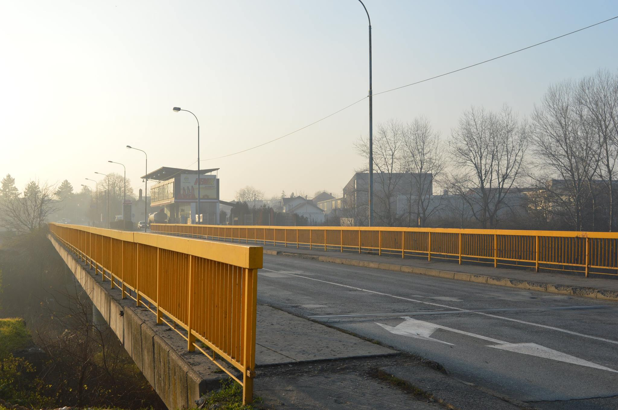 Српски (ћирилица): Слика моста на реци Расини у Крушевцу